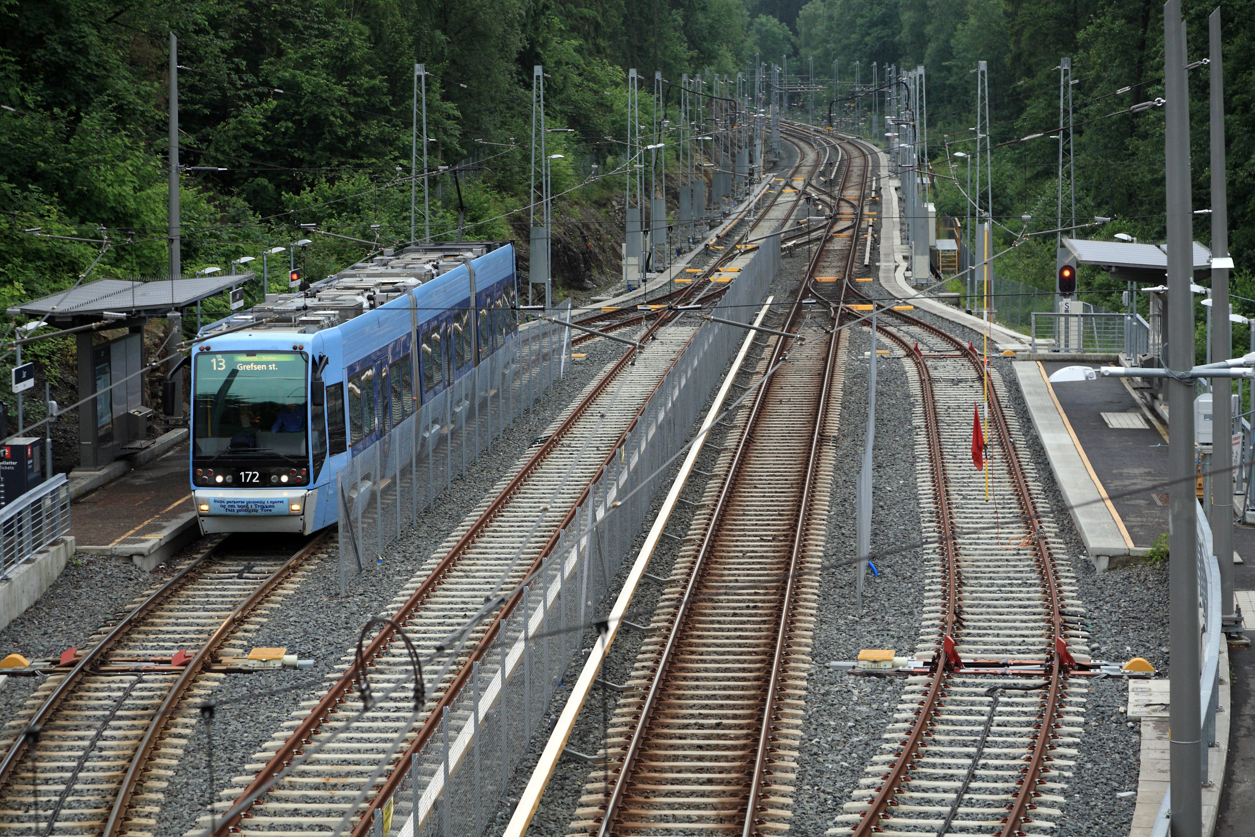 Stromschienenlose Randgleise mit separaten Niederflurbahnsteigen für die Straßenbahnzüge der Lilleakerbane. Im Sommer 2013 enden diese hier und verkehren nur über die linke Seite. Auf dem rechten durchgehenden Hauptgleis verkehren die Züge der Linie 2 von und nach Gjønnes.Alle vier Gleise sind mit Fahrleitung überspannt.